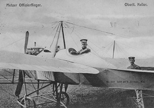 Metzer Offizierflieger ; Oberlt. Keller (1913)